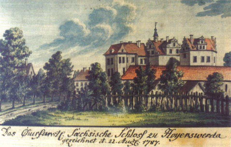 Schloss Hoyerswerda, gezeichnet von Johann Gottfried Schultz (1734–1819)